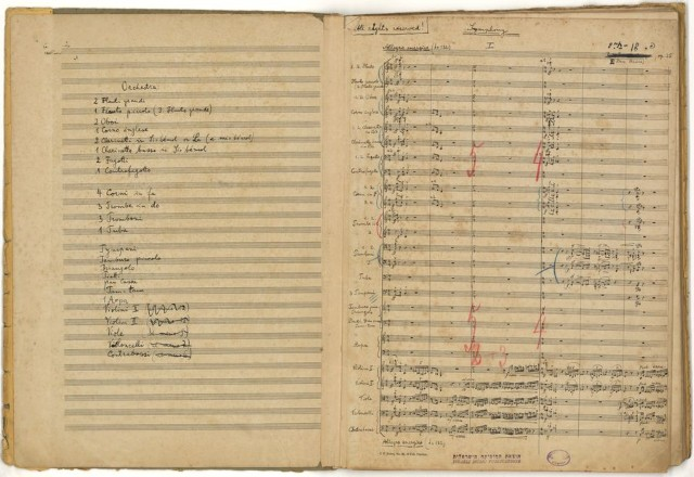 סימפוניה מס' 1 , כת"י, 1940, עמוד ראשון (מס' קטלוגי: MUS 055 / B163)